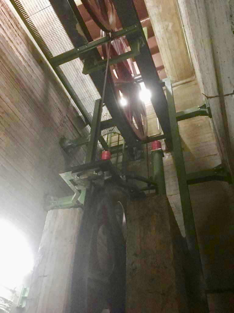 Contrappeso Funicolare di Catanzaro